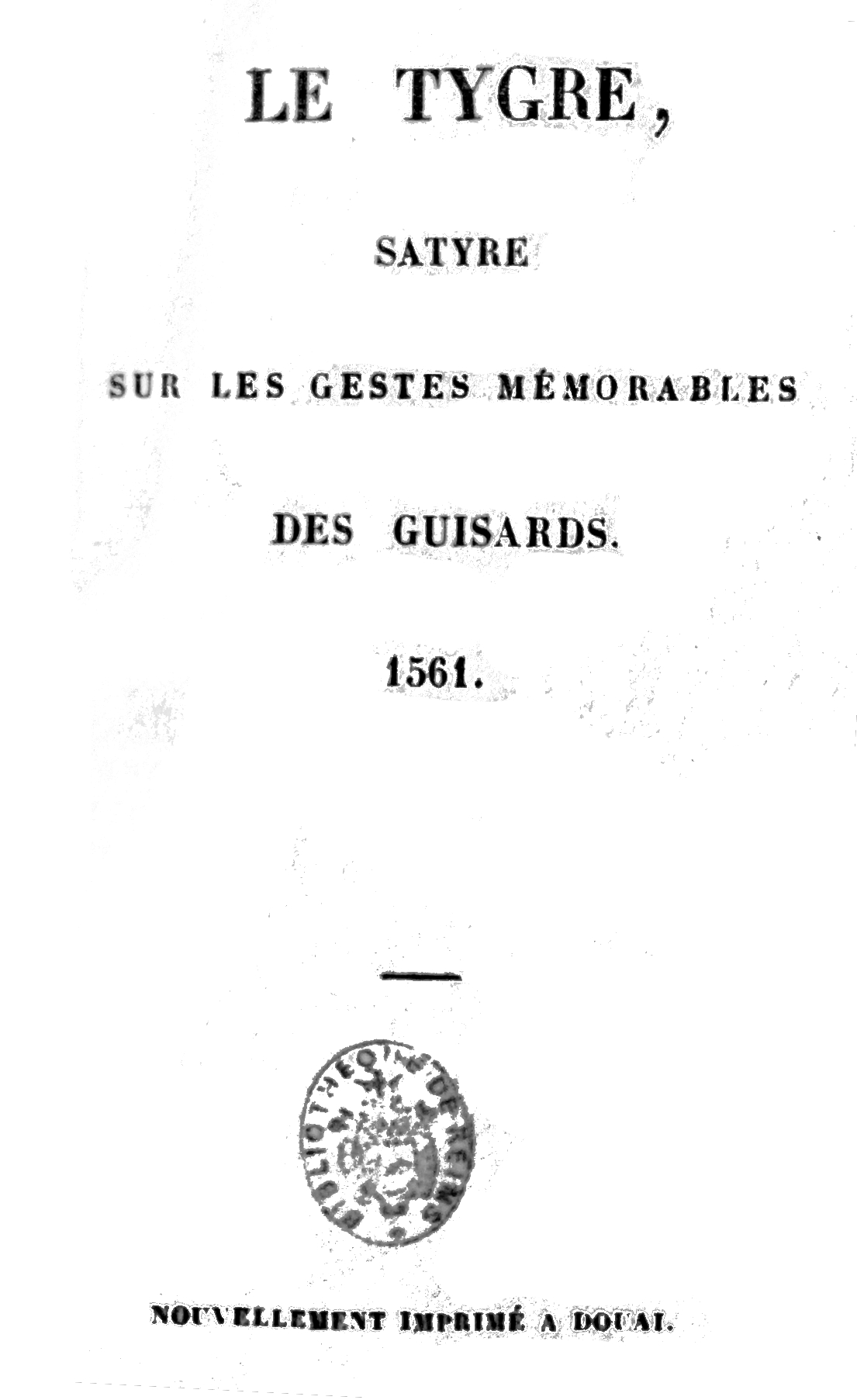 réédition de l'oeuvre en 1843.